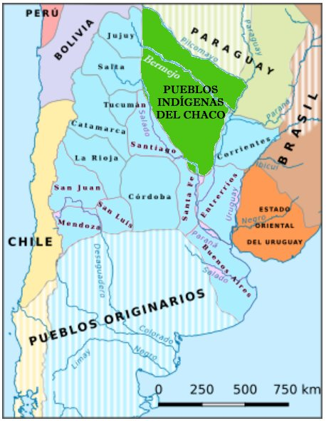 Mapa de las 14 provincias argentinas y los territorios indígenas limítrofes hacia 1840s